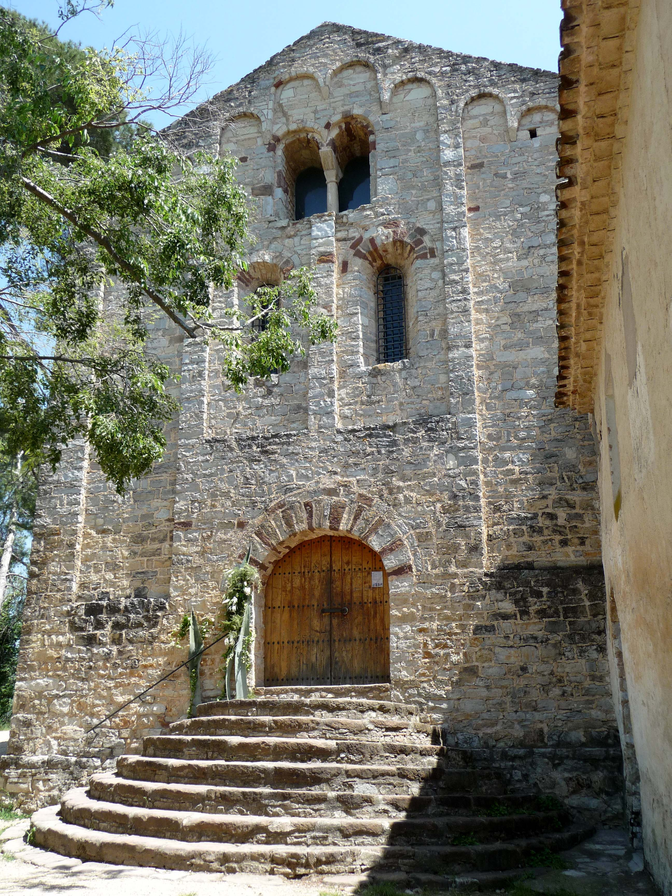 Façana de Sant Ponç de Corbera, església d'estil romànic llombard, amb notable escalinata, del segle XI, a Cervelló (Baix Llobregat).